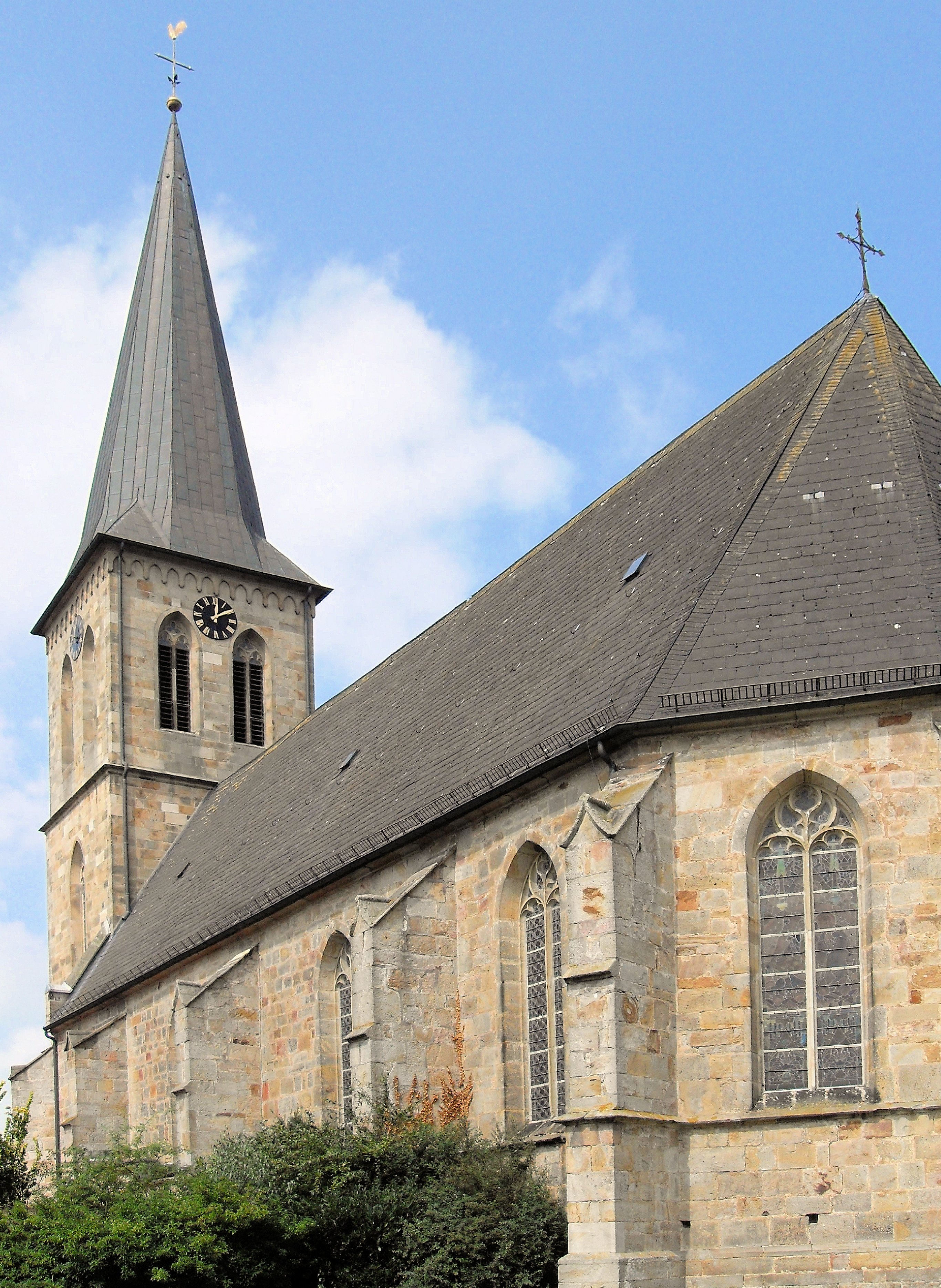 Pfarrkirche St. Servatius in Beesten, Landkreis Emsland